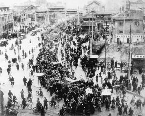 1935年12月9日在北平發生的學生運動，來自搜狐相關頁面，